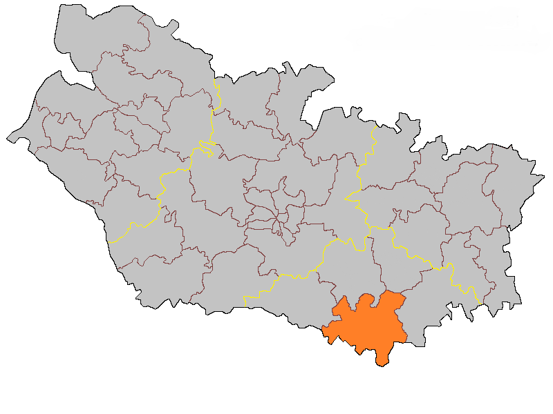 Кантон Мондидье на карте департамента Сомма